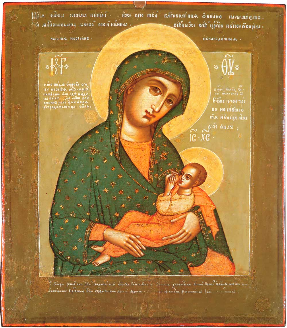 Богоматерь Блаженное чрево (Хабаровская). Авксентьев Иван 1664 г. Оклад: последняя треть XVII в. Дерево, темпера; оклад серебро, чеканка, канфарение, чернь, золочение. 31 × 27 см. Владимиро-Суздальский историко-художественный и архитектурный музей заповедник, Владимир